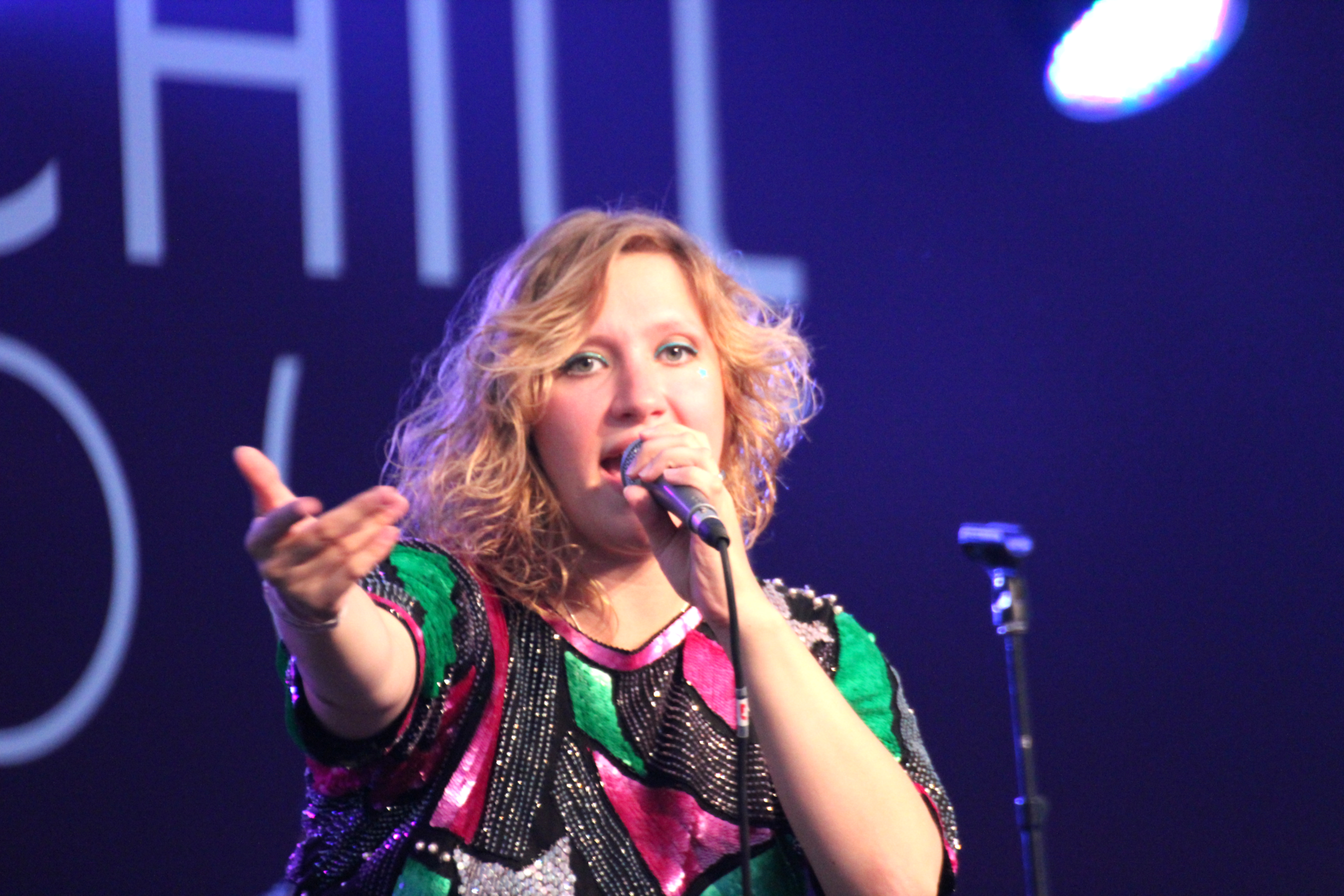 Sofia Rubina esinemas Õllesummeril.